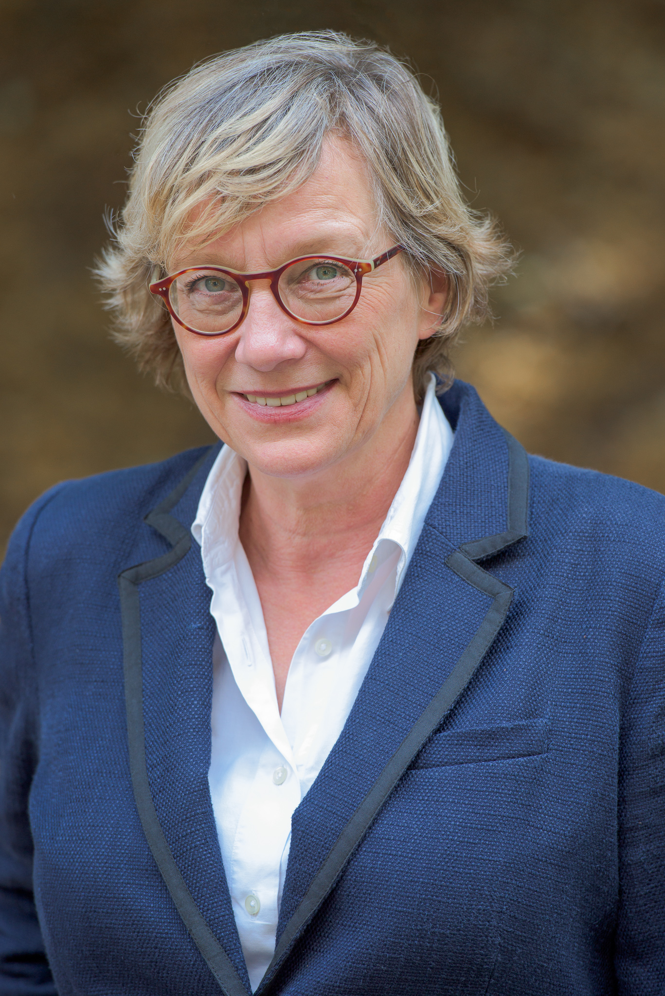 Bayerischer Rundfunk,Beate Langmaack,Das Recht sich zu sorgen,Franken-Tatort,Tatort